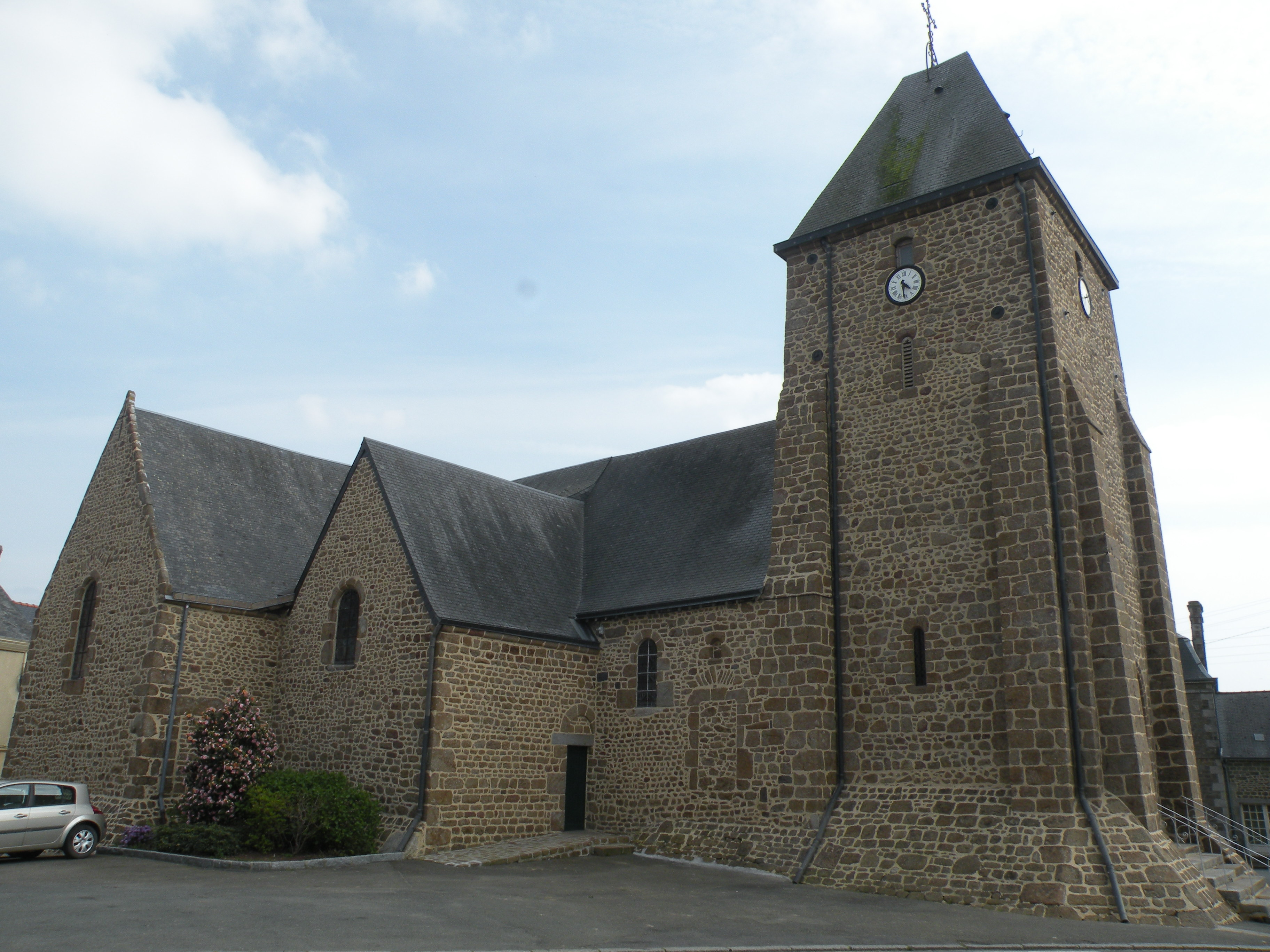 église Saint-Pierre et Saint-Paul de Le Horps